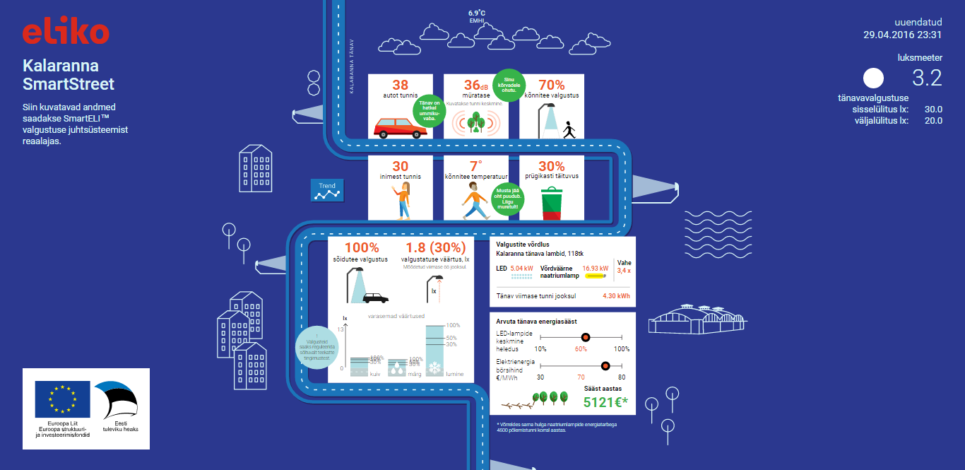 Eesti esimese targa tänava veebilehe kuvatõmmis.